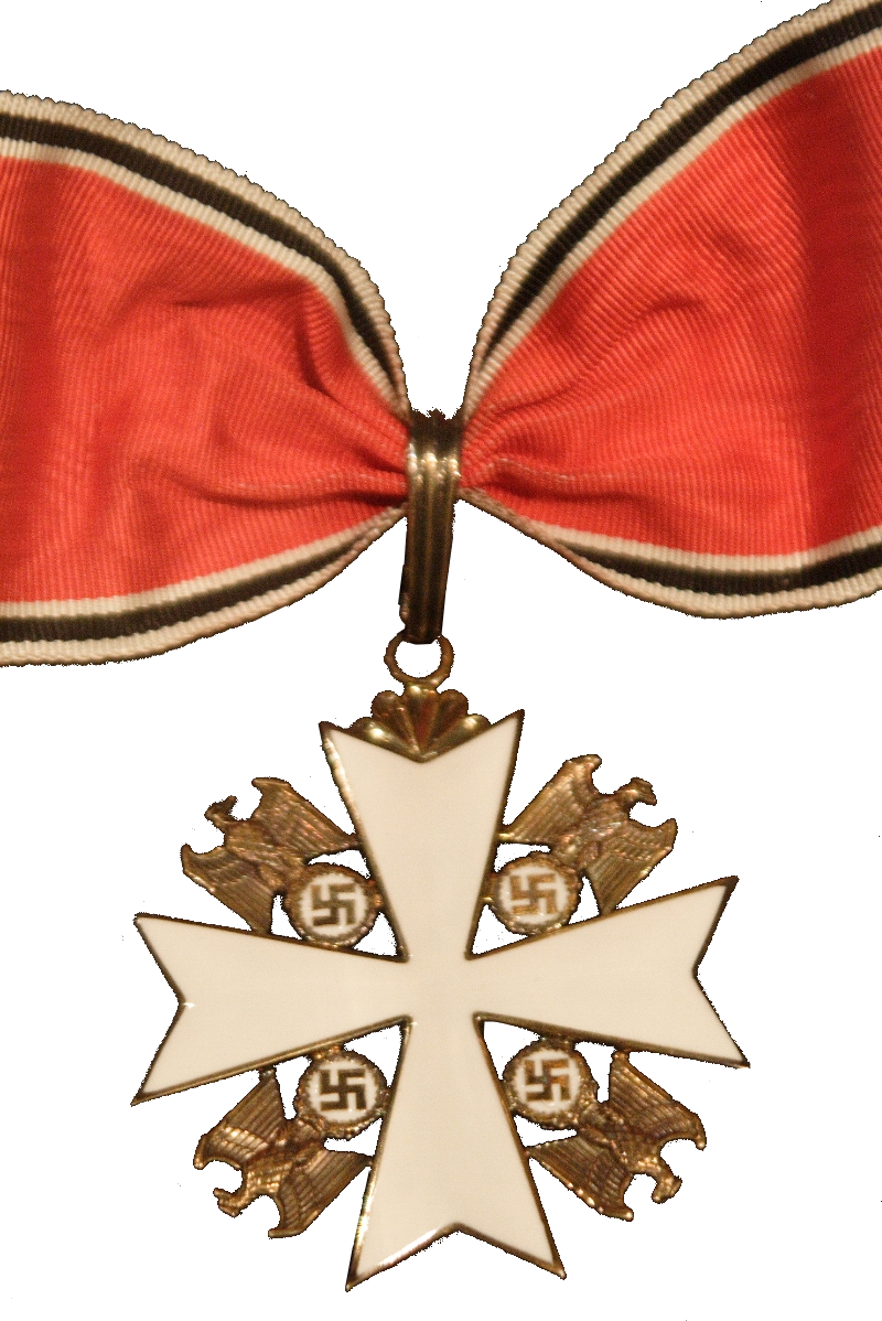 Verdienstorden vom Deutschen Adler der 3. Klasse von Charles Lindbergh. Seitenverkehrte Fotografie, da der Reichsadler vom Betrachter aus nach rechts schaut und nicht nach links. Hoheitsadler und Hoheitszeichen waren beidseitig geprägt und emailliert worden. Daher wurde hier die Rückseite irrtümlich für die Vorderseite gehalten. Charles Lindbergh's Service Cross of the German Eagle (Verdienstorden vom Deutschen Adler), Missouri History Museum, St. Louis, Missouri